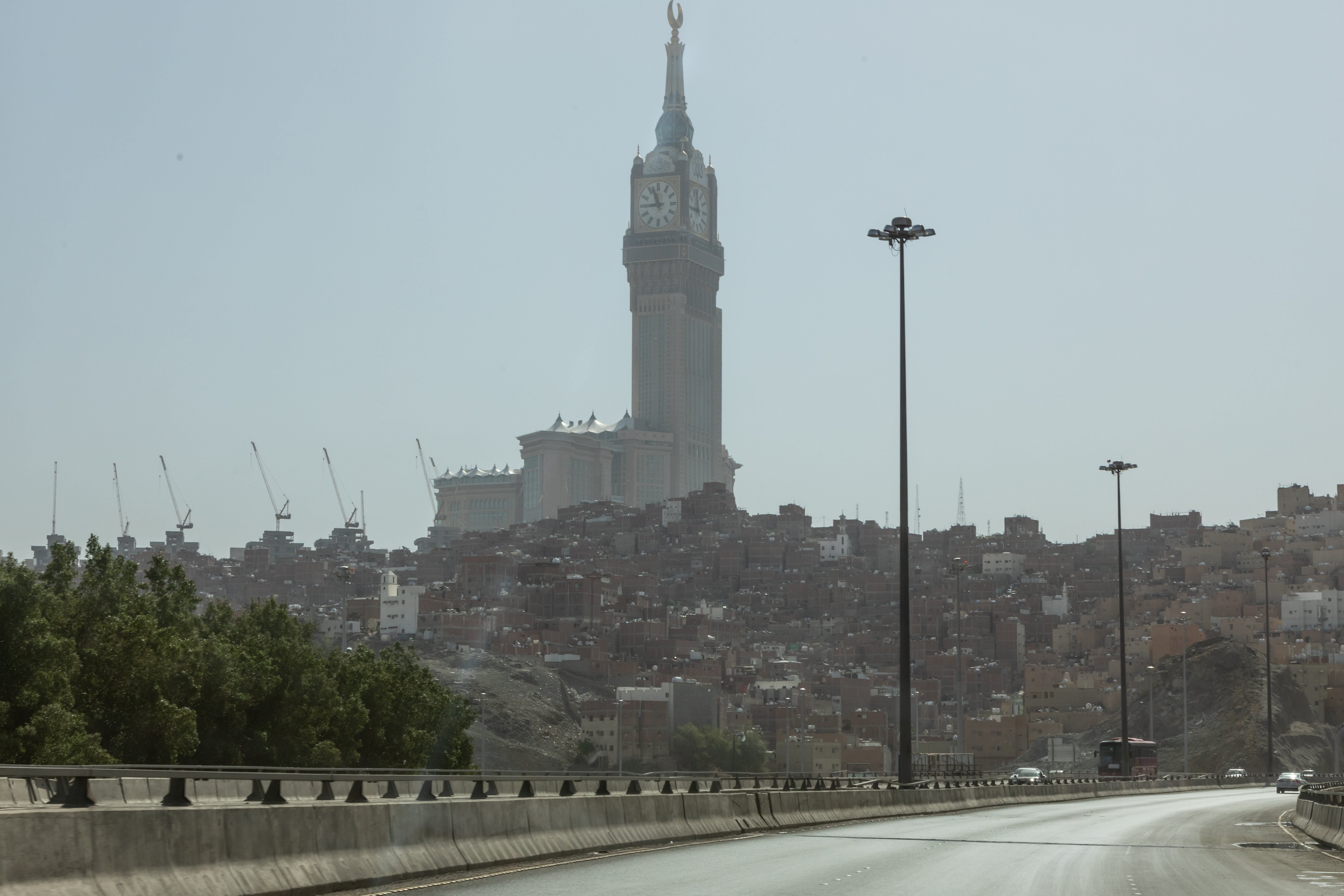 حي النكاسة بمكة المكرمة